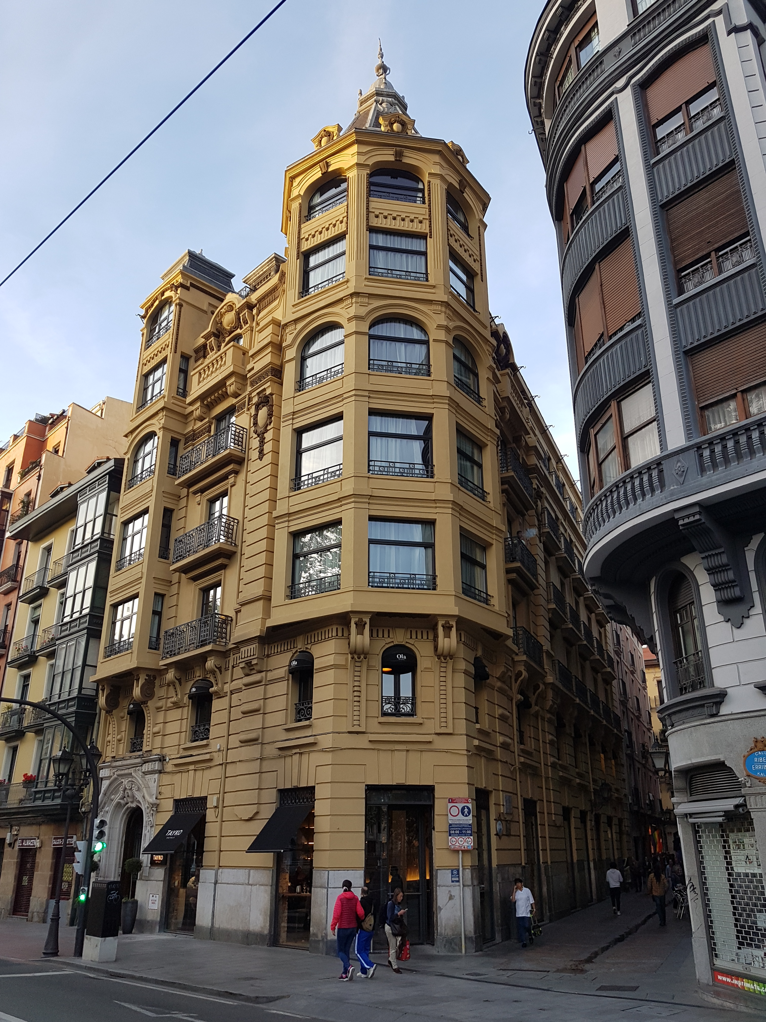 Hotel Tayko Bilbao.